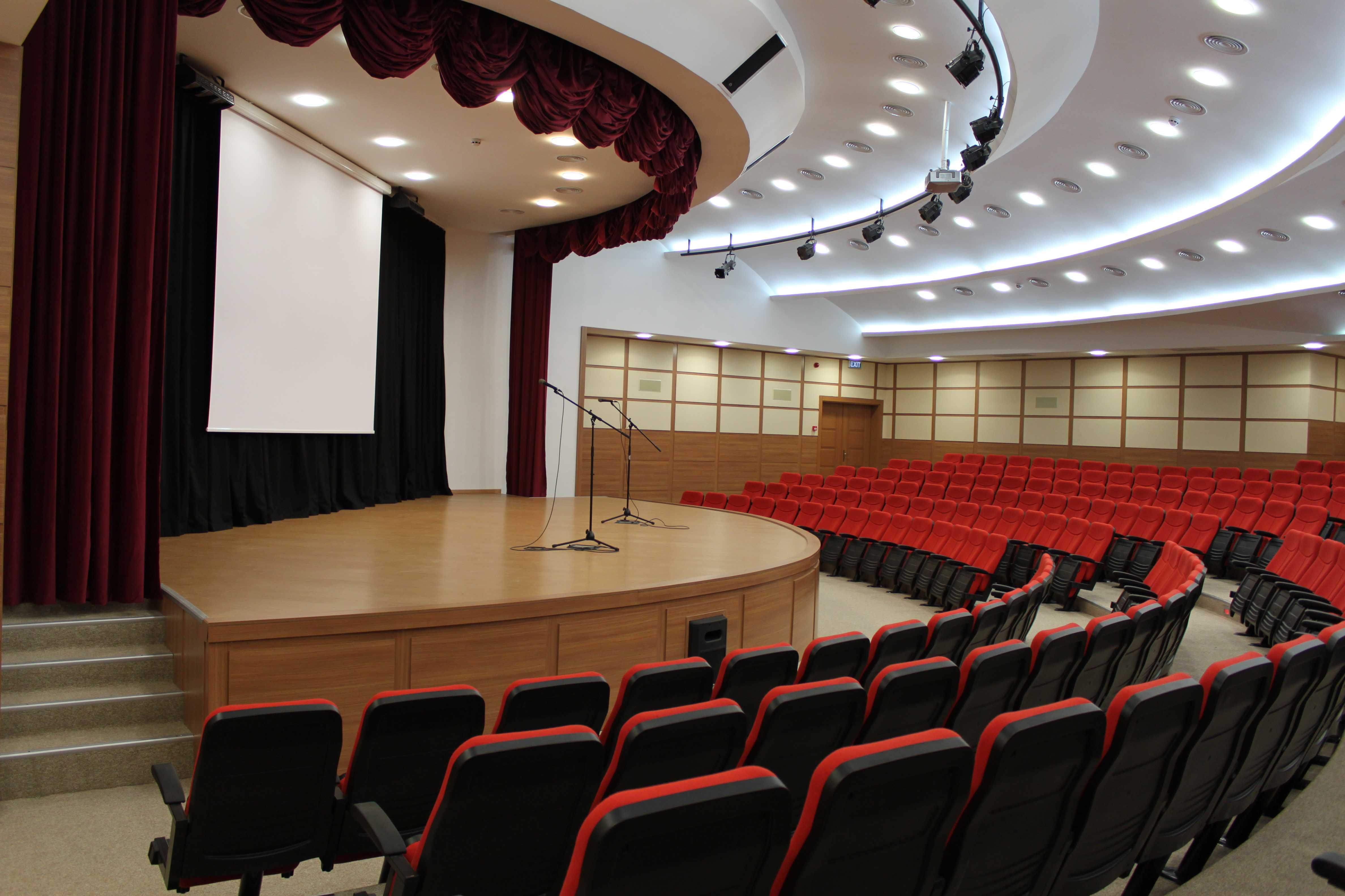 Okul salon